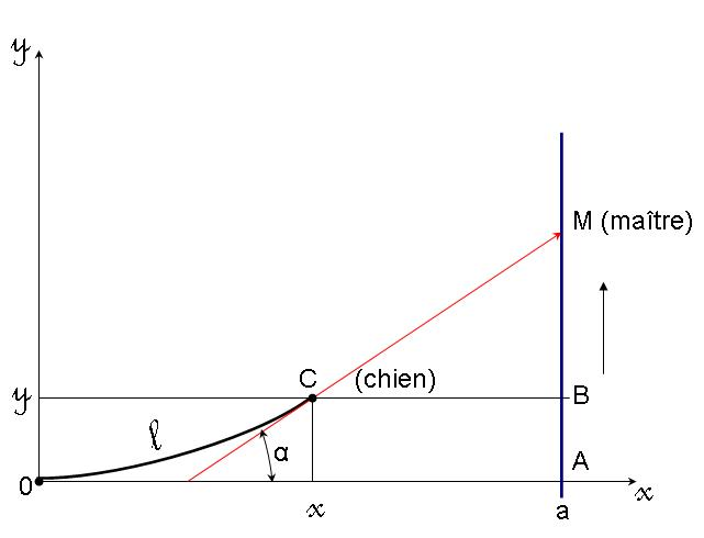 Illustration d'un problème d'application des équations différentielles. Trajectoire d'un chien accourant vers son maitre.